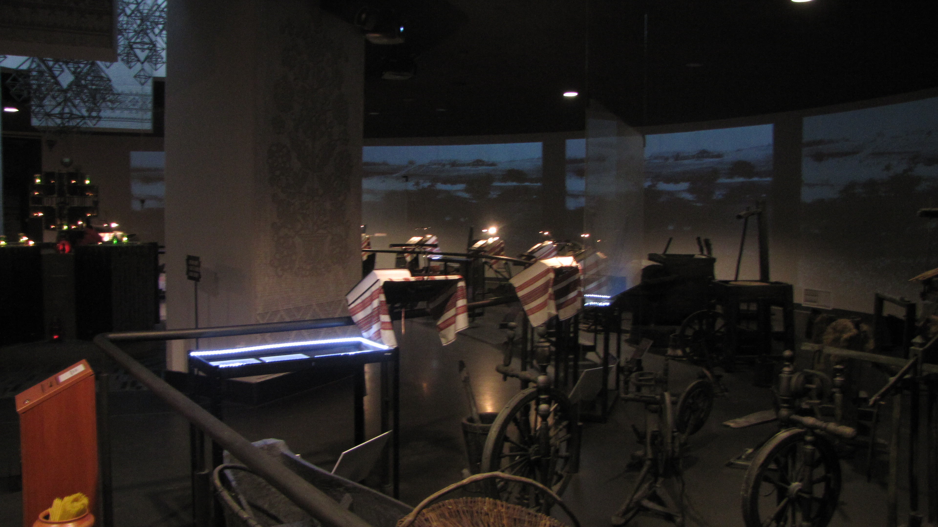 інтер'єр Меморіалу